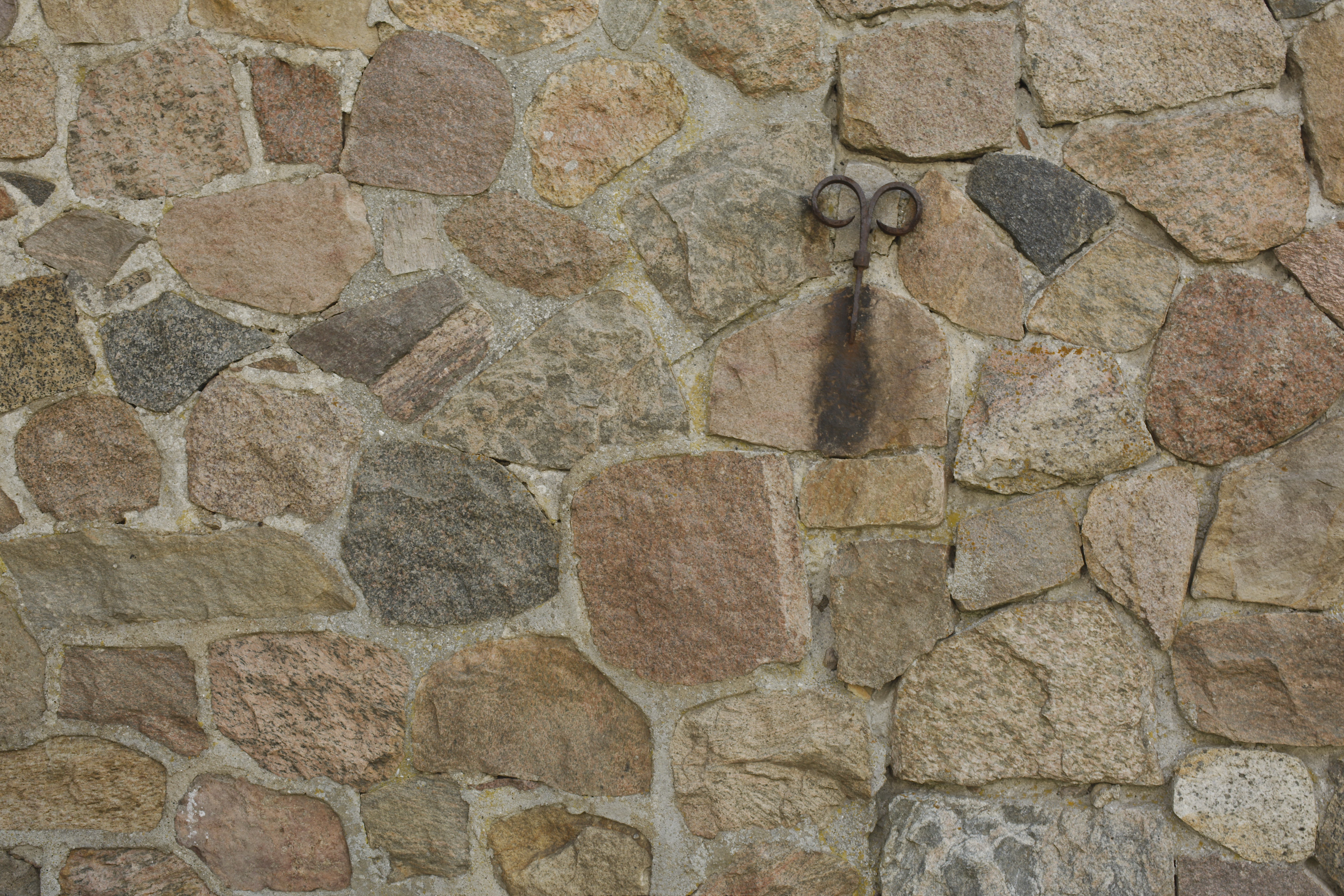 Nærbillede af mur af kløvet kamp